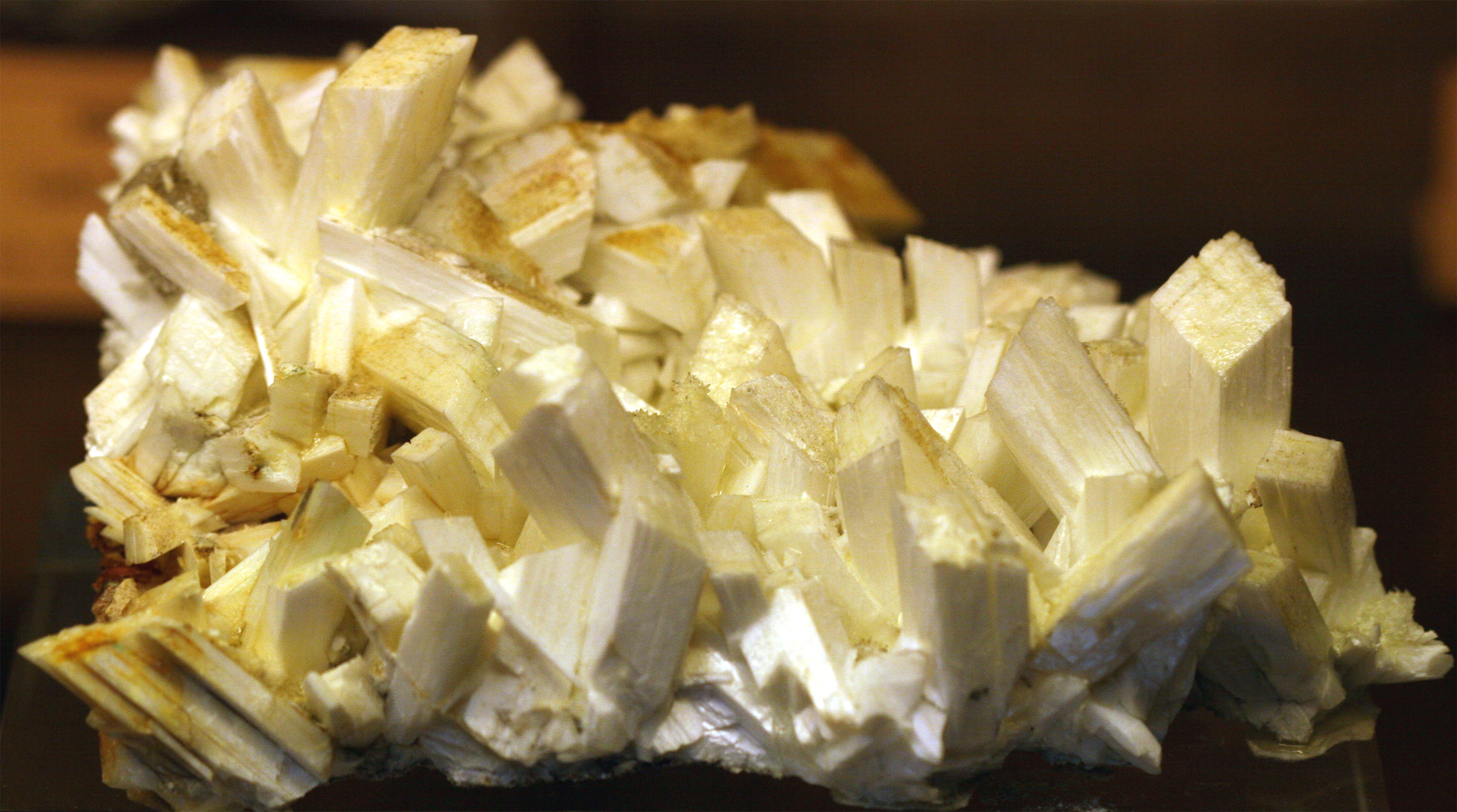 Laumontita